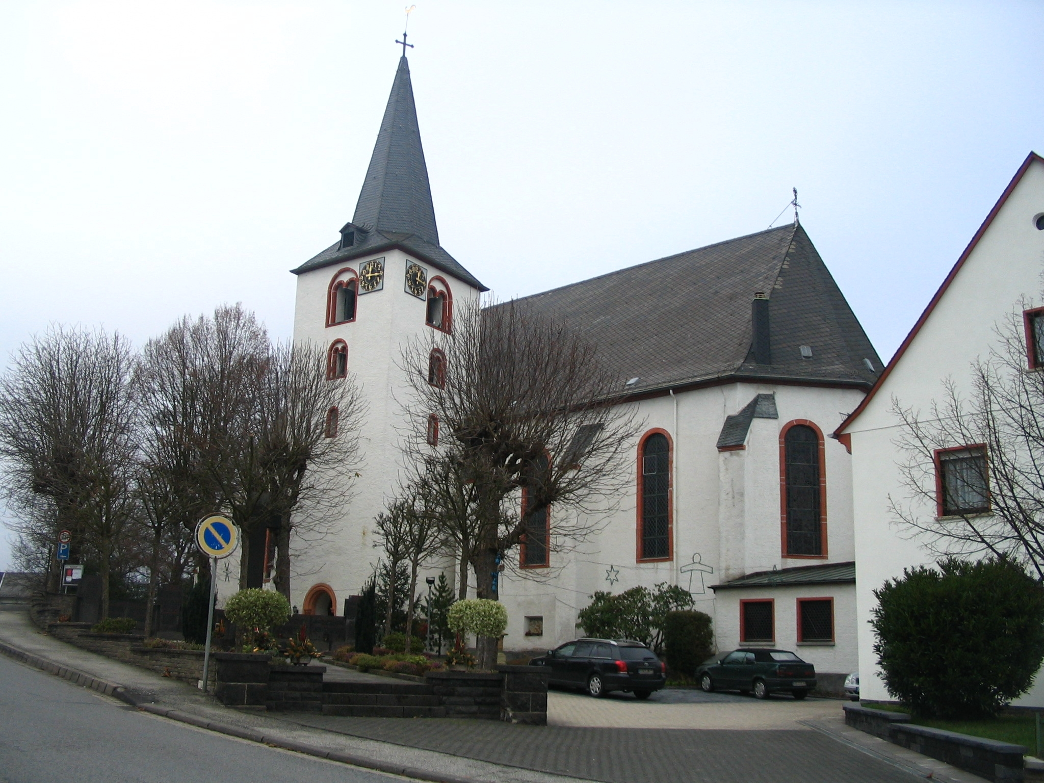 Kirche Blankenrath im Hunsrück